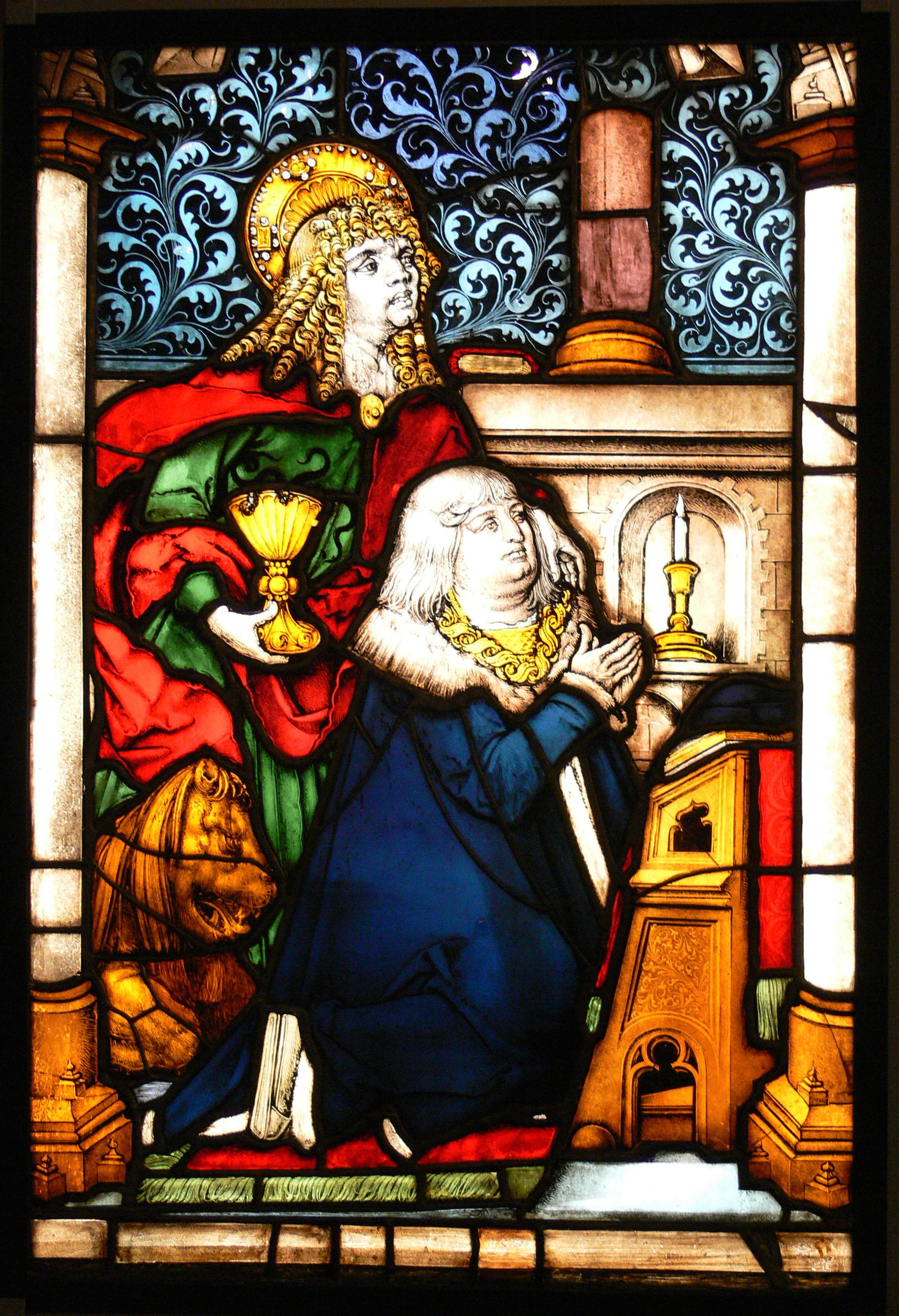 München, Bayerisches Nationalmuseum: Herzog Albrecht IV. von Bayern, empfohlen vom hl. Johannes; München oder Regensburg; Glasfenster aus dem Chor der Klosterkirche der Kartause Prüll in Regensburg